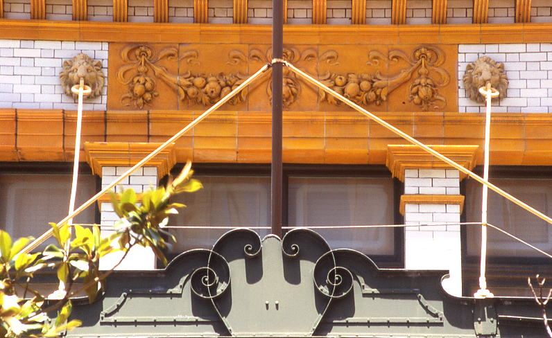 downing centre, sydney